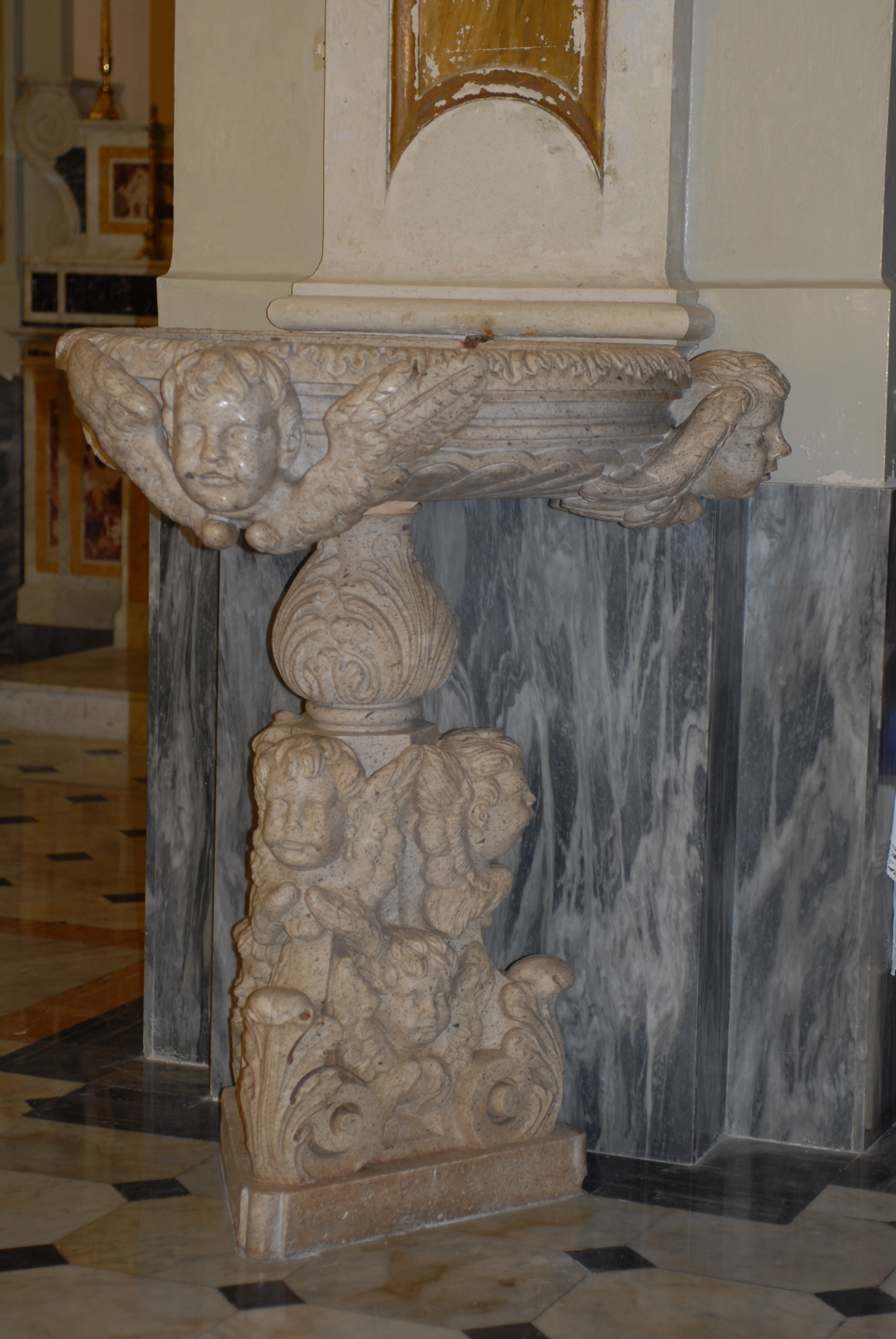 Acquasantiera in pietra di Padula nella Chiesa di san Michele Arcangelo, proveniente dalla Certosa di san Lorenzo ed attribuita ad Andrea Carrara.